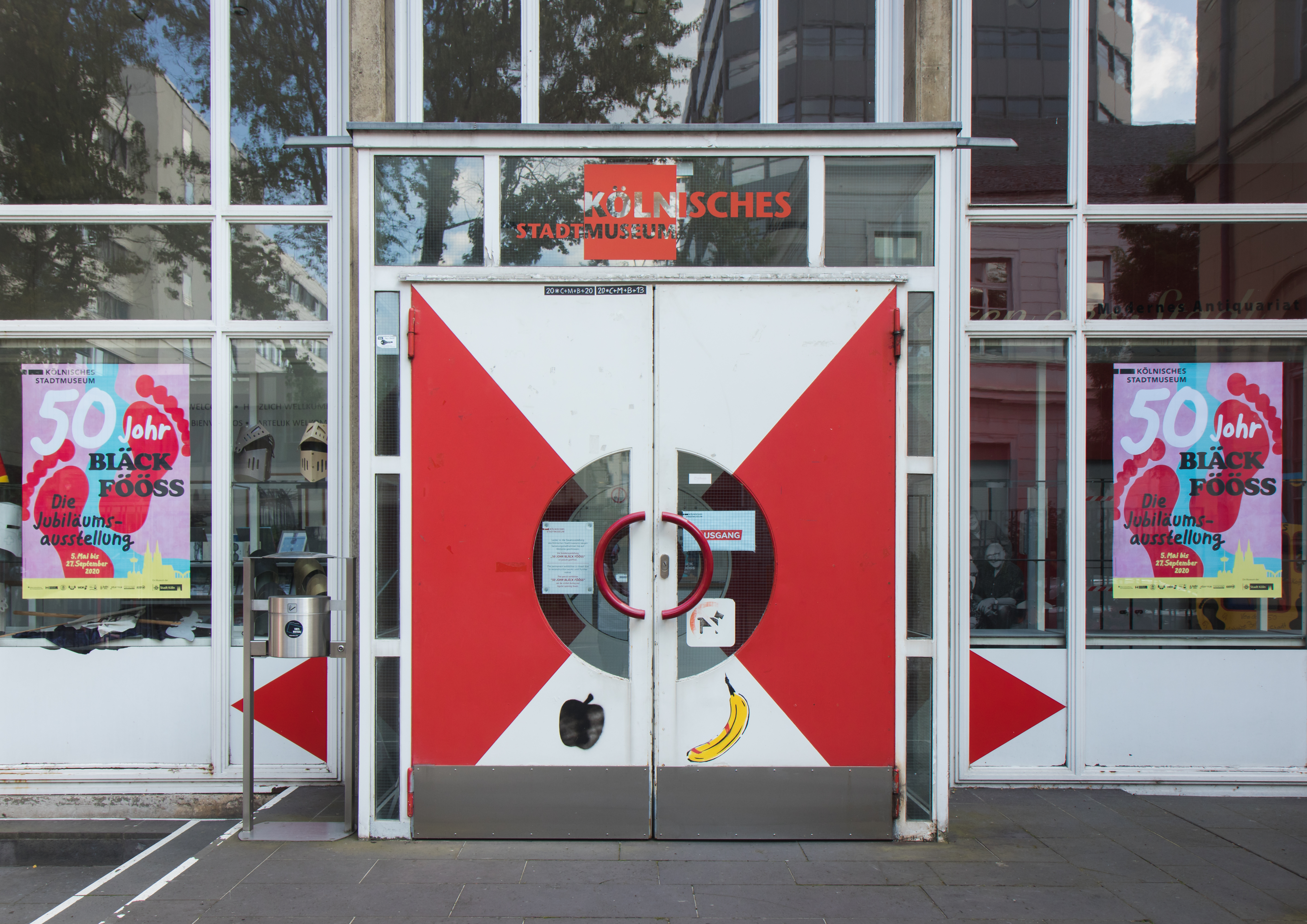 Kölnisches Stadtmuseum in Zeughaus und Alter Wache. Hier:Eingangsbereich im Zwischenbau